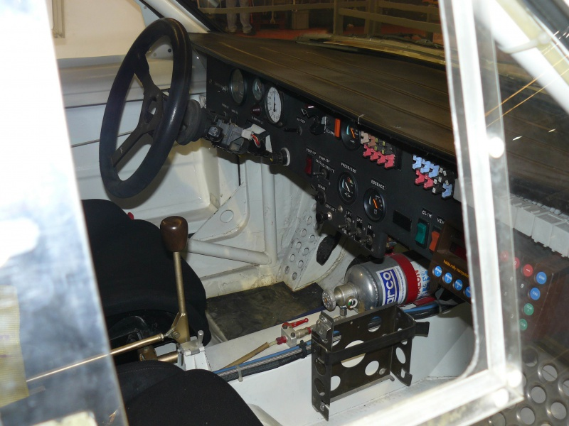 Retromobile 2012